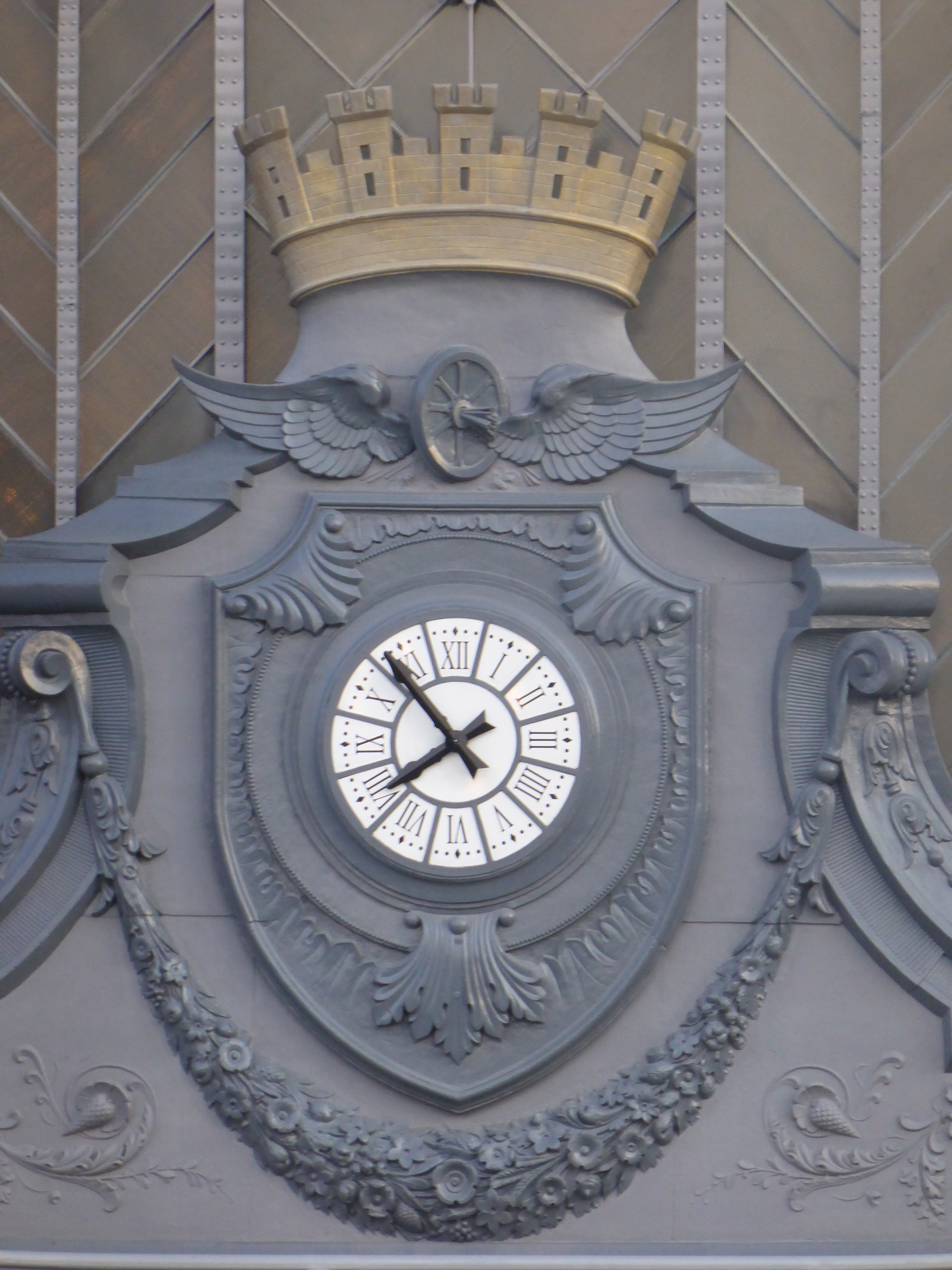 Detalle exterior del testero de la estación de Atocha, de Madrid (España), construida en acero en el año 1892. Encima del reloj, vemos una rueda alada, símbolo de los ferrocarriles.